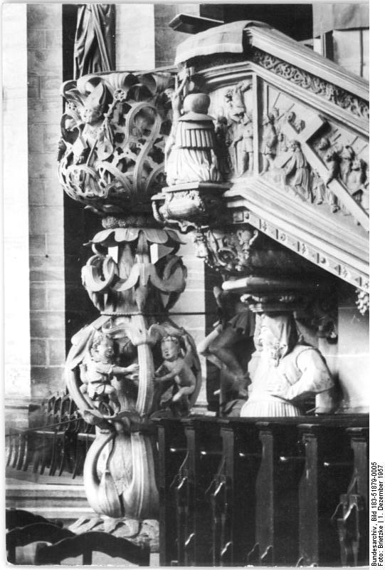 Freiberg, Dom Unserer Lieben Frauen, Kanzel Zentralbild Brietzke 1.12.1957 Qua-Noa. Schöne deutsche Heimat. UBz: Der Freiberger Dom. Die Bergmannskanzel, dahinter die Tulpenkanzel, die um 1510 von dem Meister Hans Witten erbaut wurde.